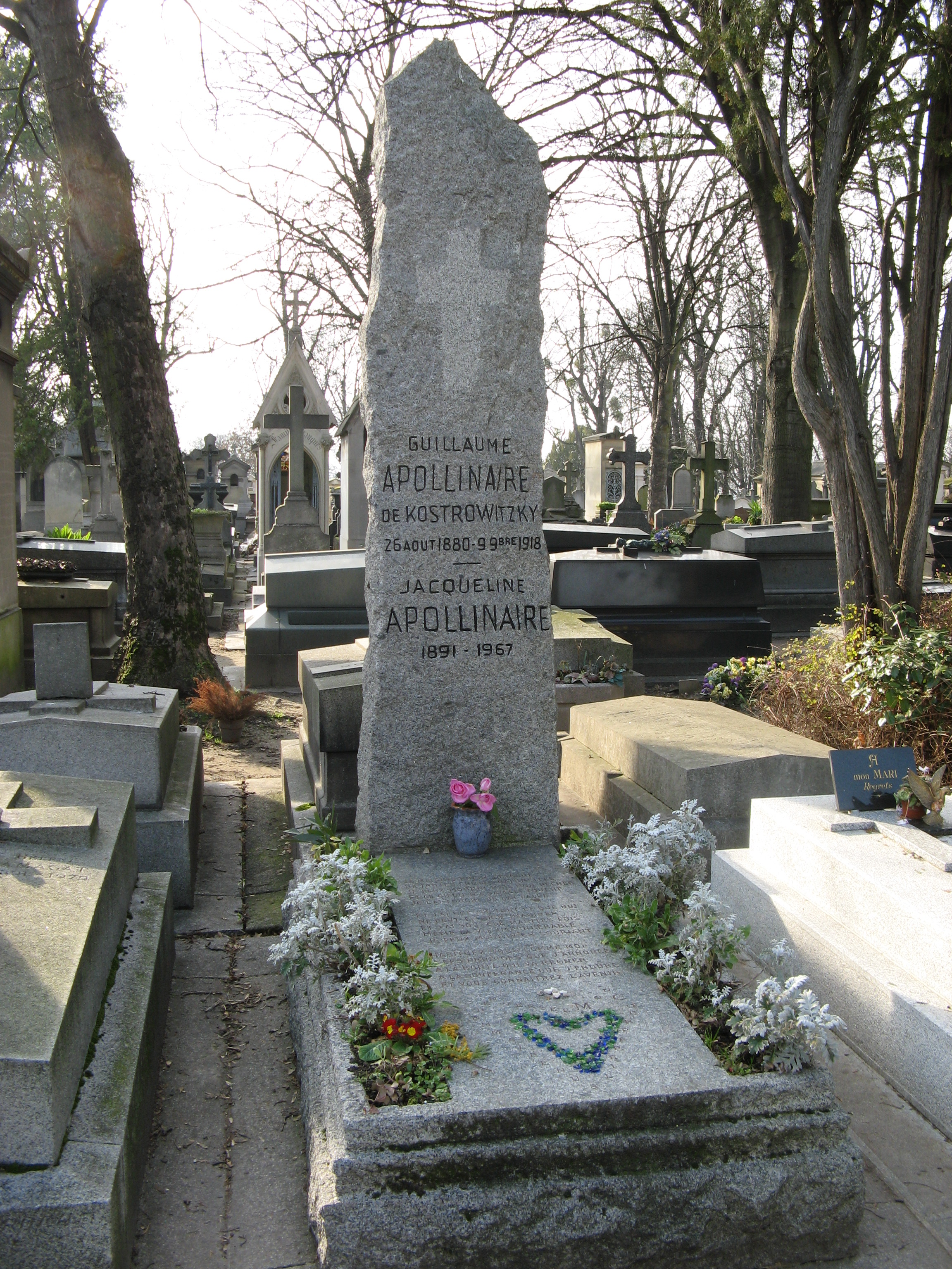 Sépulture de Guillaume Apollinaire (1880-1918) composée d'un monument en forme de menhir, d'un extrait du recueil Calligrammes et d'un calligramme de tessons verts et blancs en forme de cœur « mon cœur pareil à une flamme renversée ».